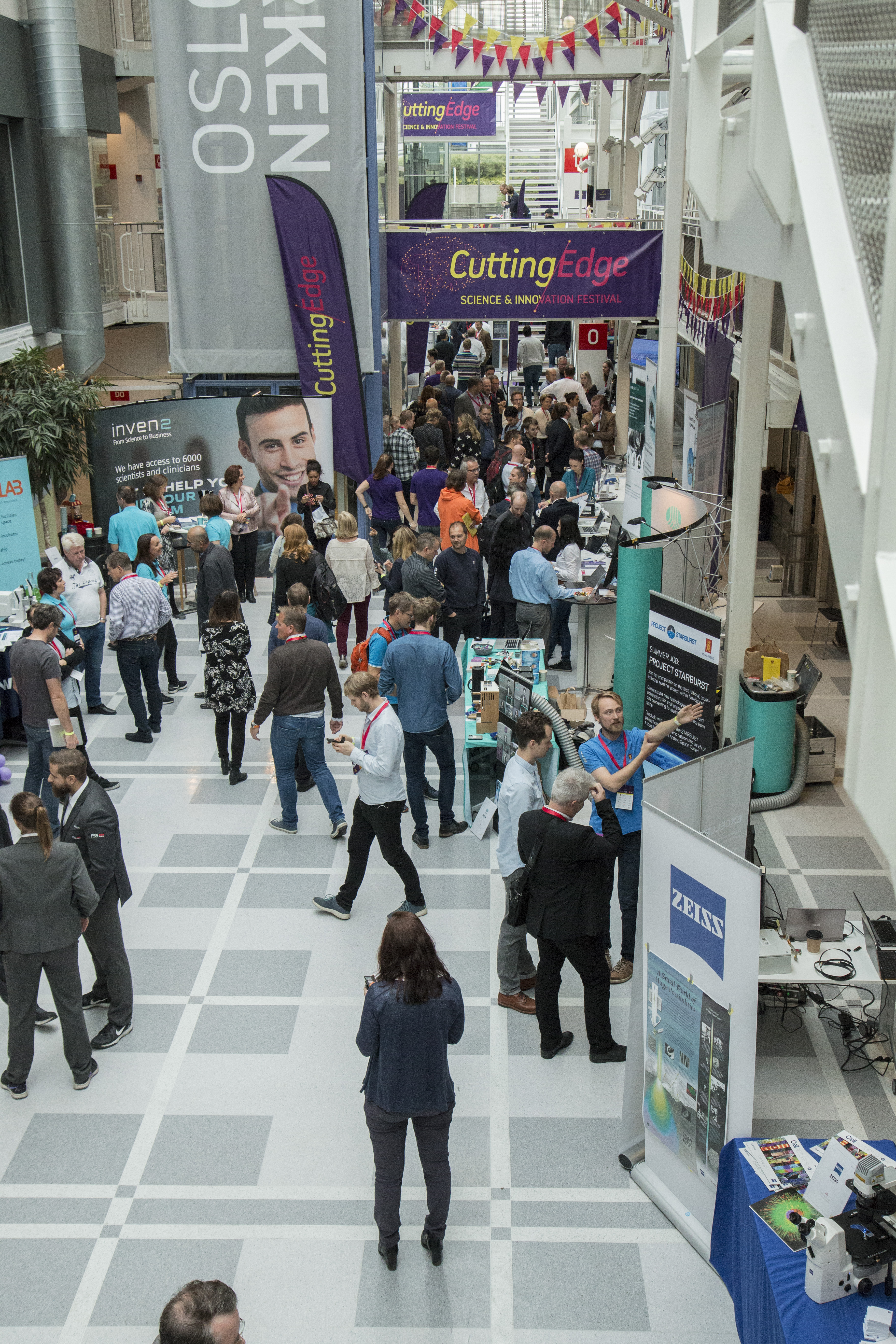 Forskningsparken under teknologikonferansen Cutting Edge 2017